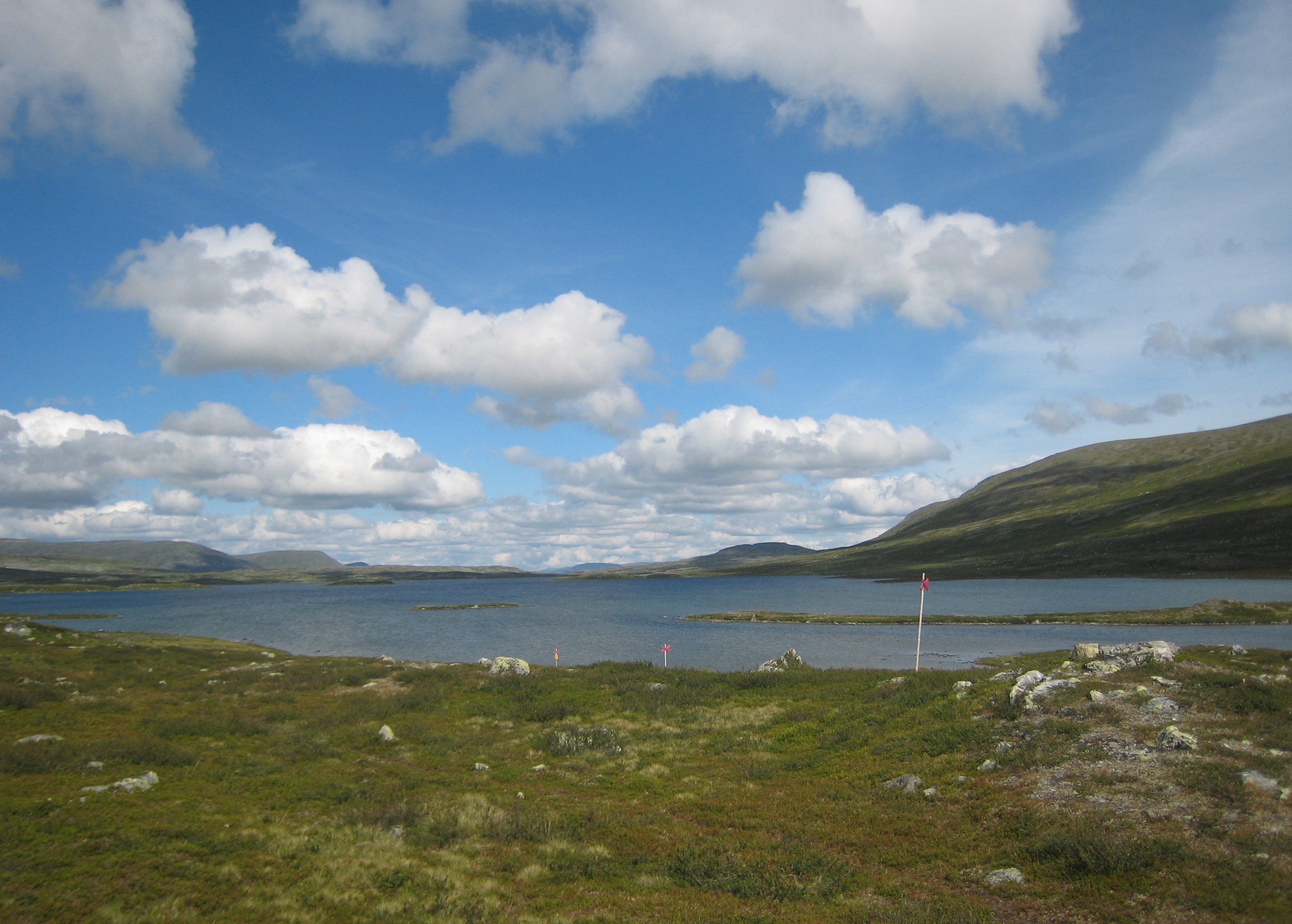 Vålåsjöns sydspets i augusti 2010. Vid sjöns södra spets får gränsen mellan Bergs kommun och Åre kommun och också landskapsgränsen mellan Härjedalen och Jämtland samt församlingsgränsen mellan Storsjö församling och Undersåker församling.